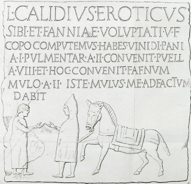 Grabstein des Lucius Calidius Eroticus, Louvre, Paris. CIL IX 2689